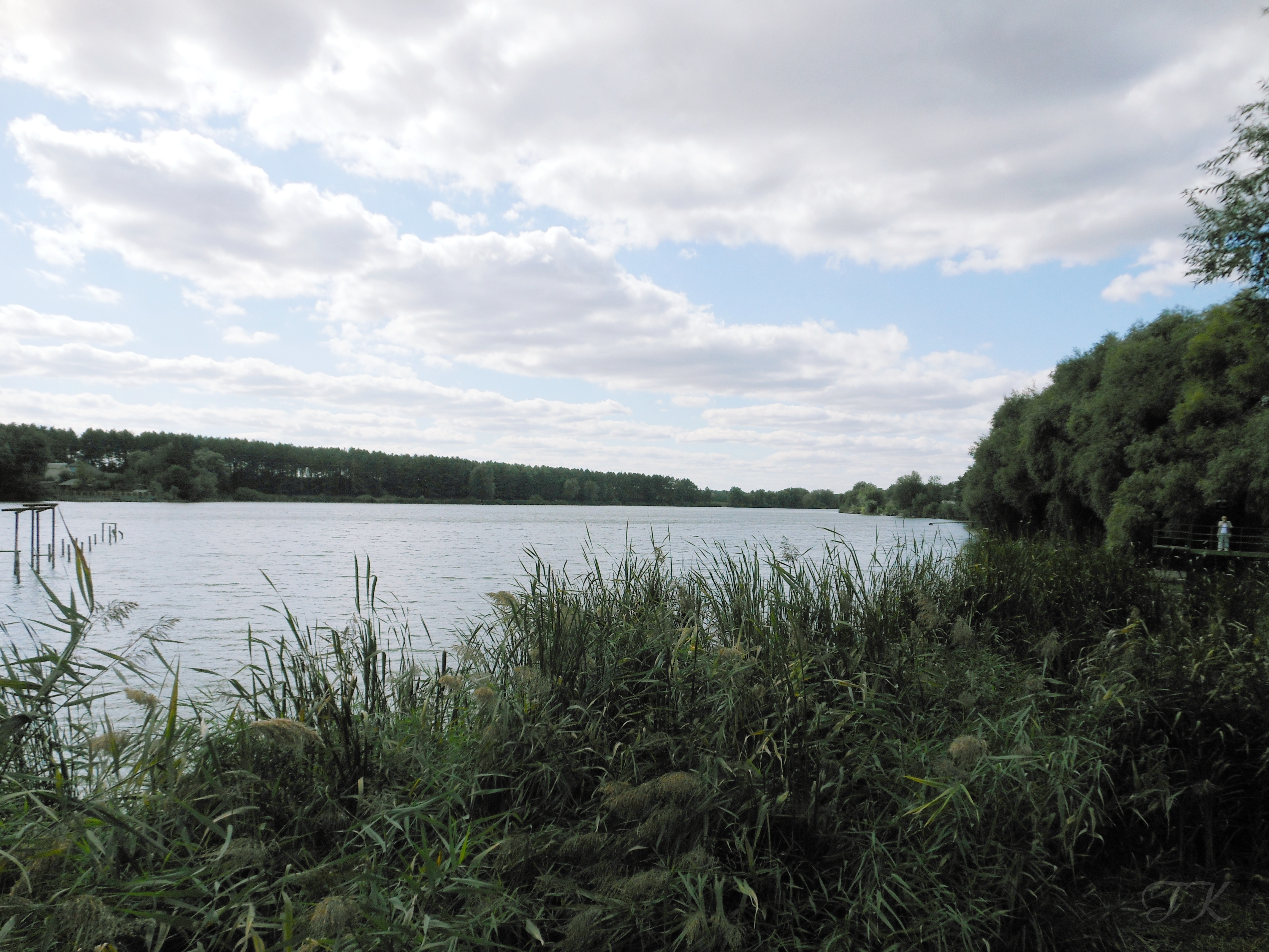 Річка Устя, м. Немирів Вінницька область